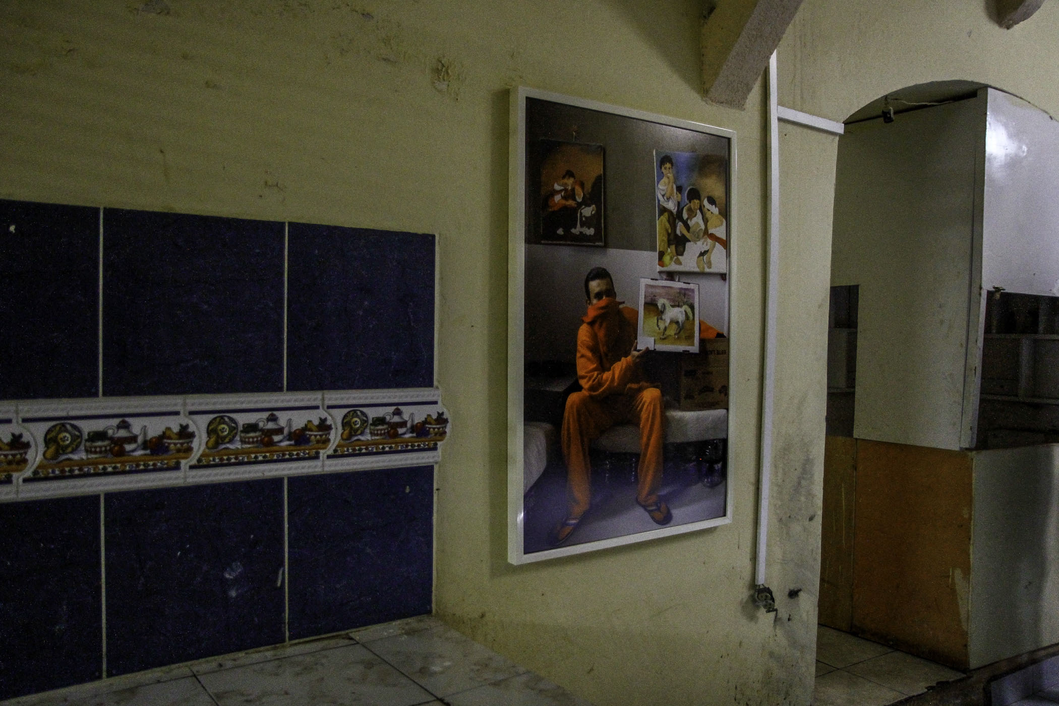 Quito, Ecuador, 20 dic (ANDES).- El Ministerio de Justicia, Derechos Humanos y Cultos presentó la exposición fotográfica "Espacios Verdes" cuyo escenario es el ex-Penal García Moreno. Esta exposición devela lo que dejaron las personas privadas de la libertad antes del cierre de este recinto carcelario. Foto: Micaela Ayala V./ANDES